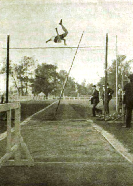 Kauser F. Jakab rúdugrása.